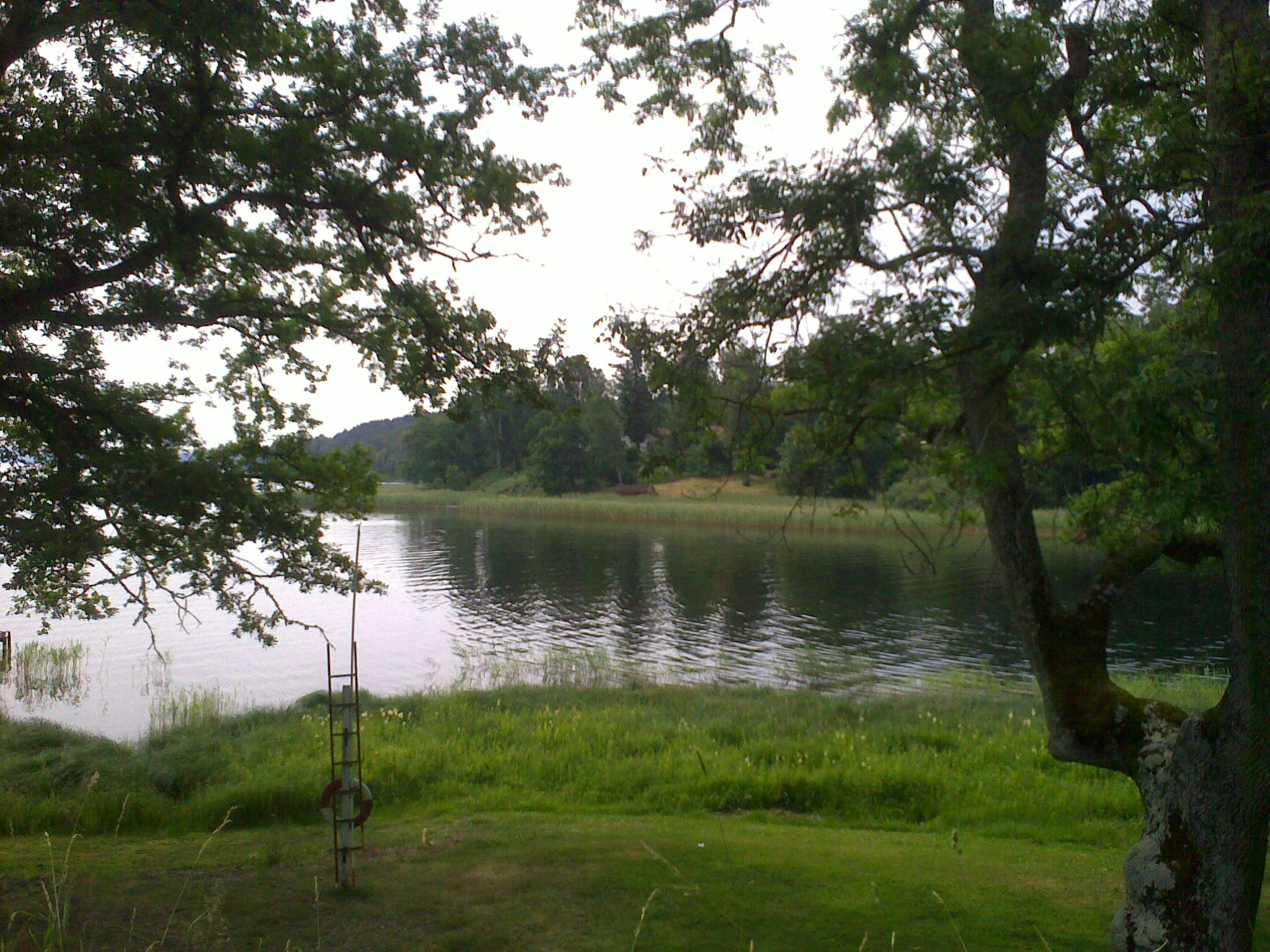 Anten